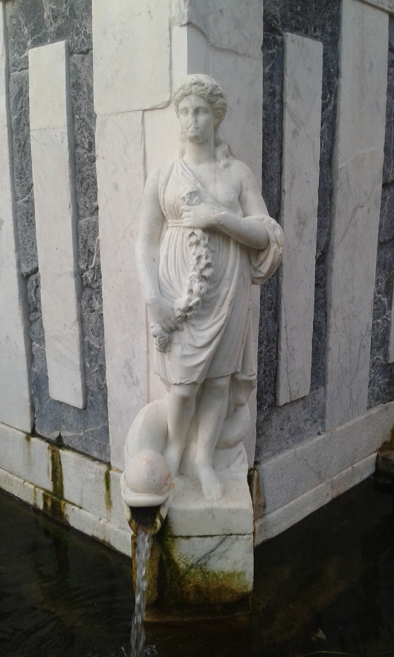 Scultura allegorica rappresentante la Primavera, fontana del Rosello Sassari